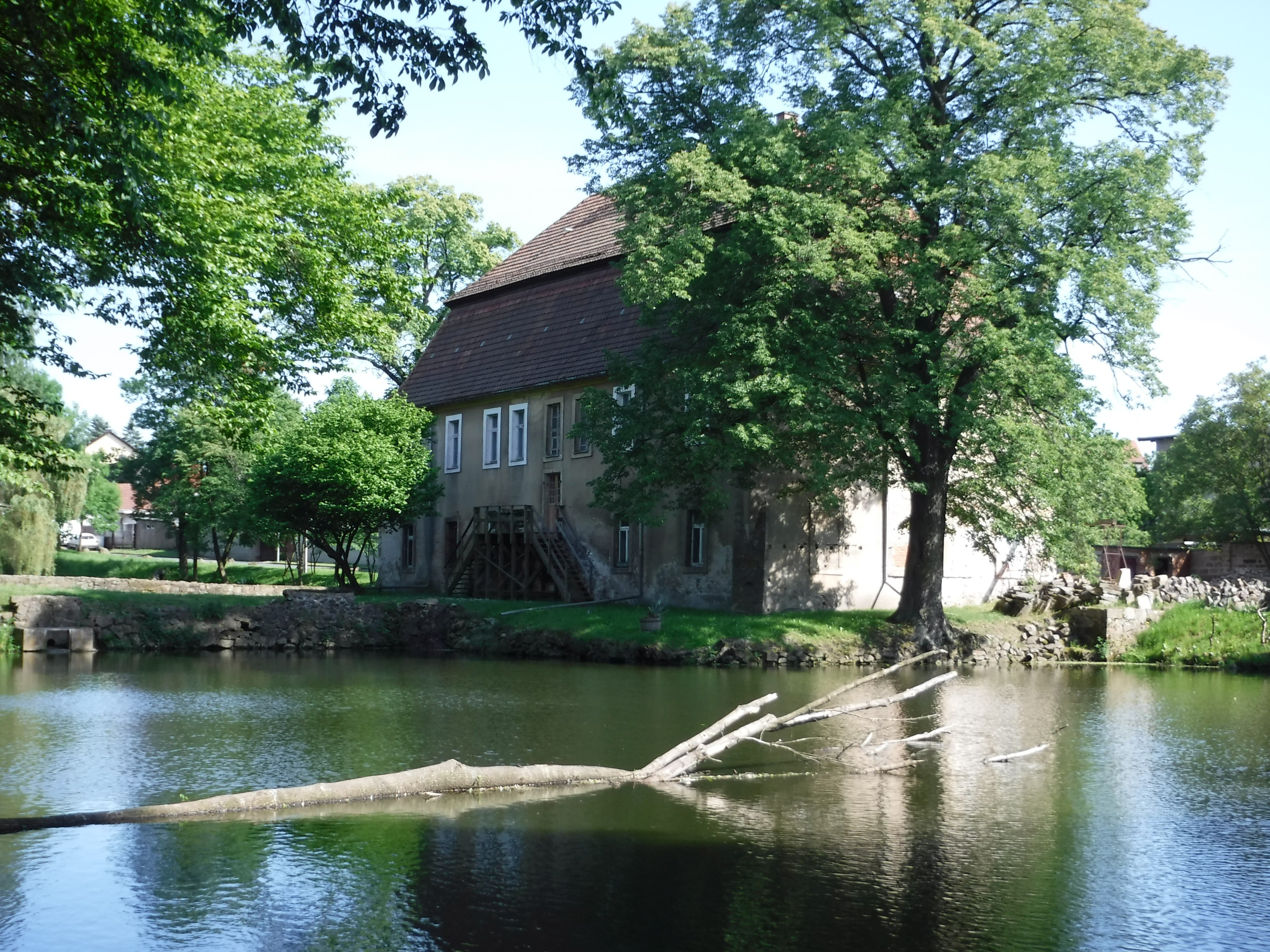 Wachwitzer Teich (Quellteich des Wachwitzbachs) im Gönnsdorfer Park am Rittergut Gönnsdorf